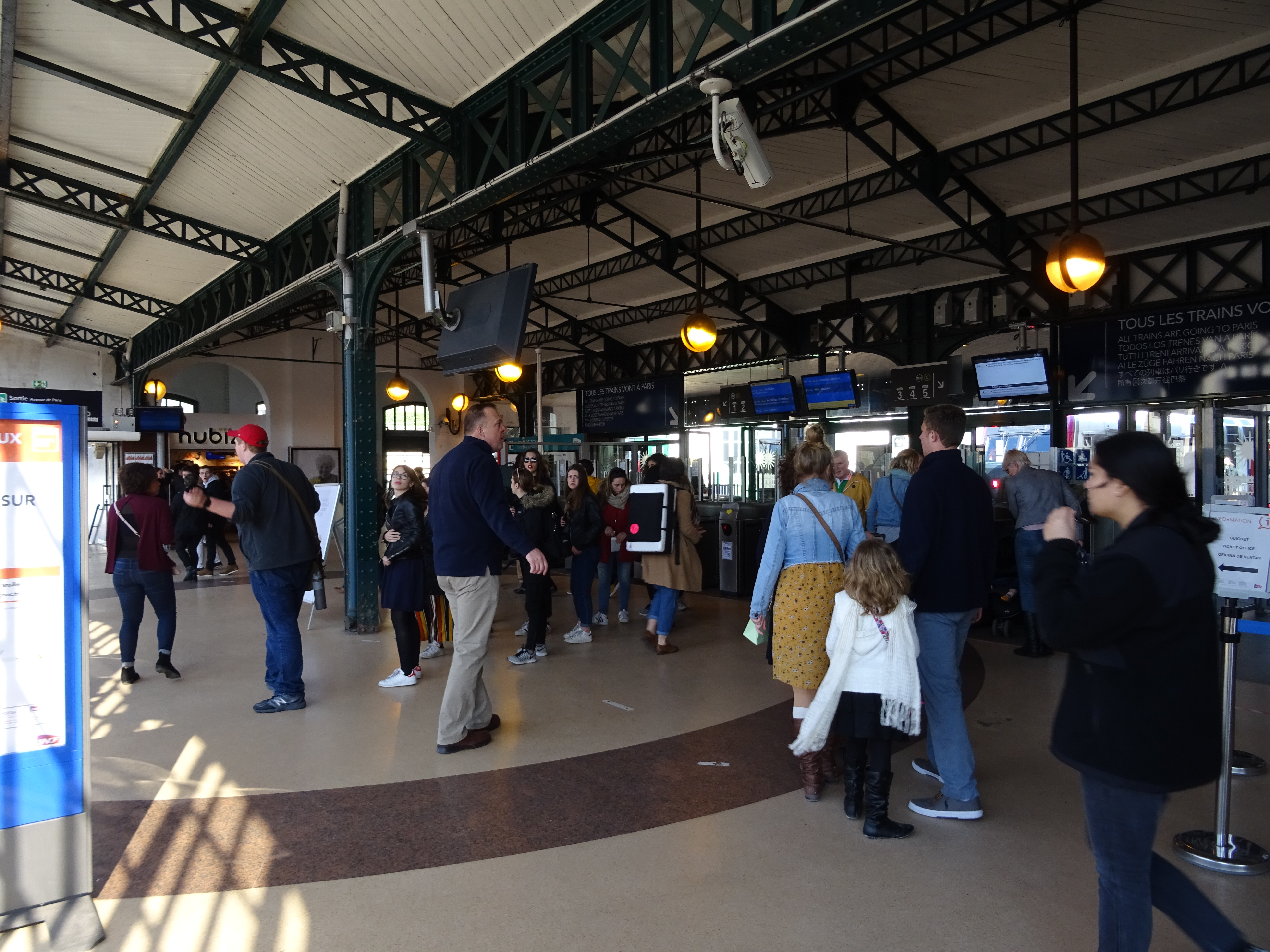 Hall intérieur de la gare de Versailles-Château-RG